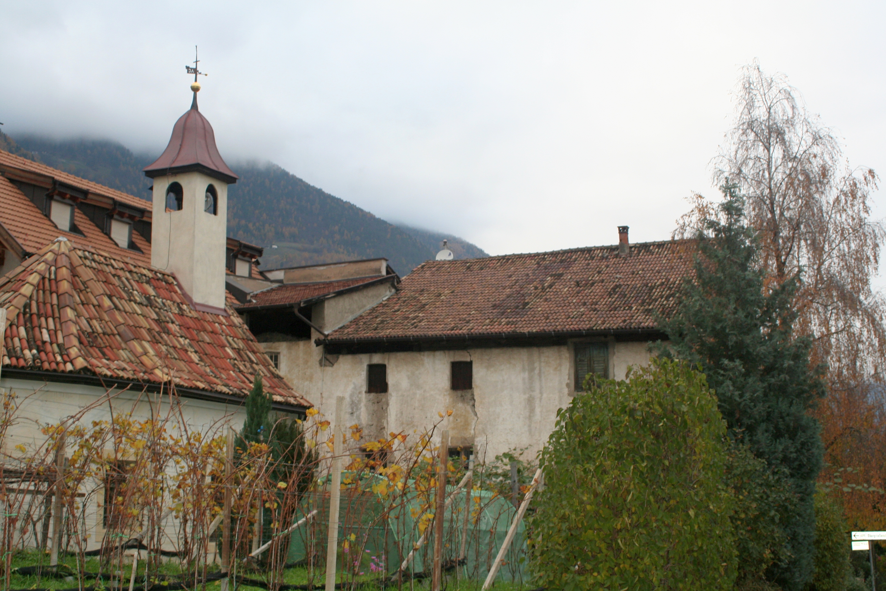 Ansitz Grießenstein mit Magdalenakapelle in Lana